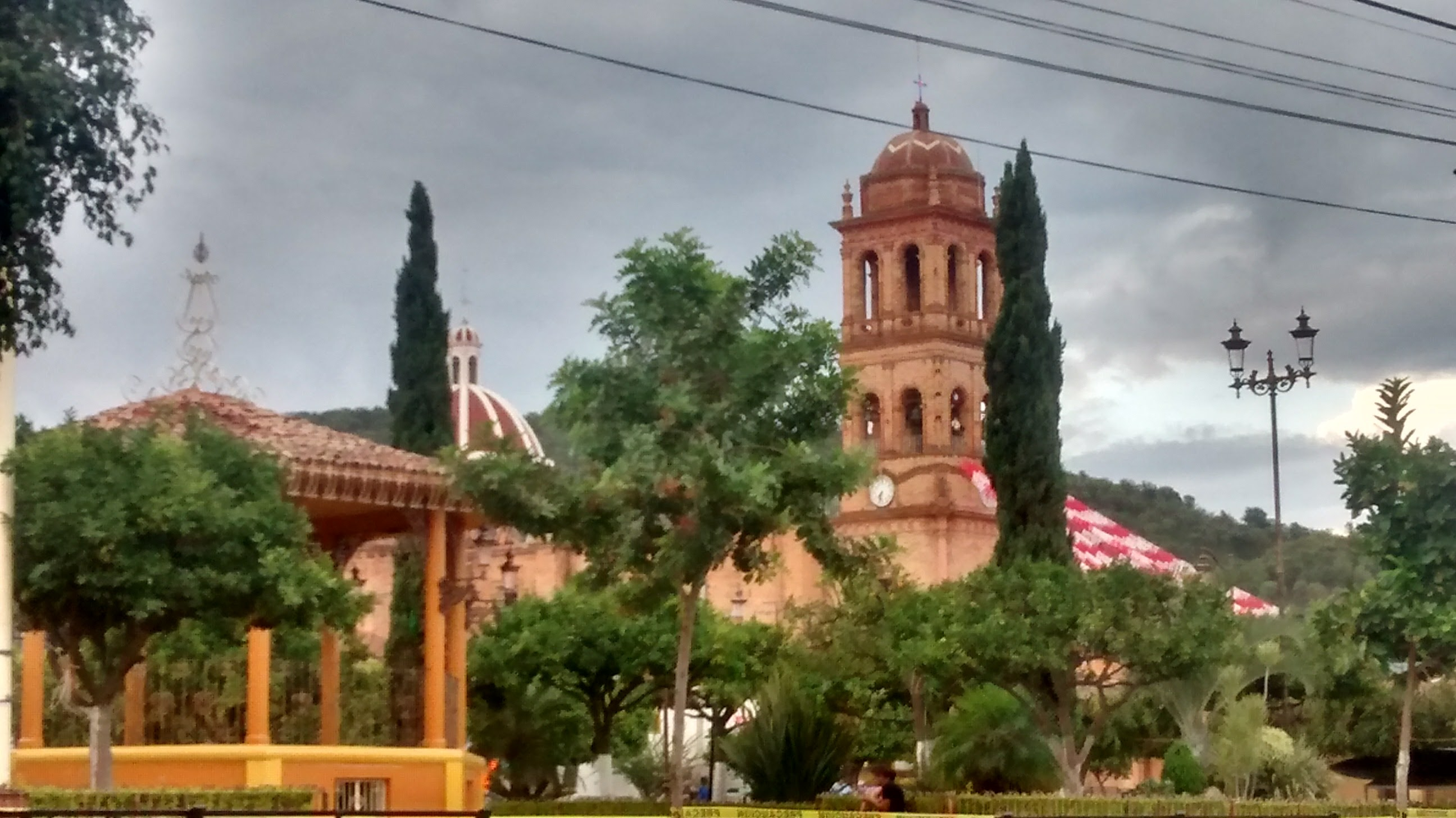 Foto de la plaza principal y el templo del sagrado corazon.